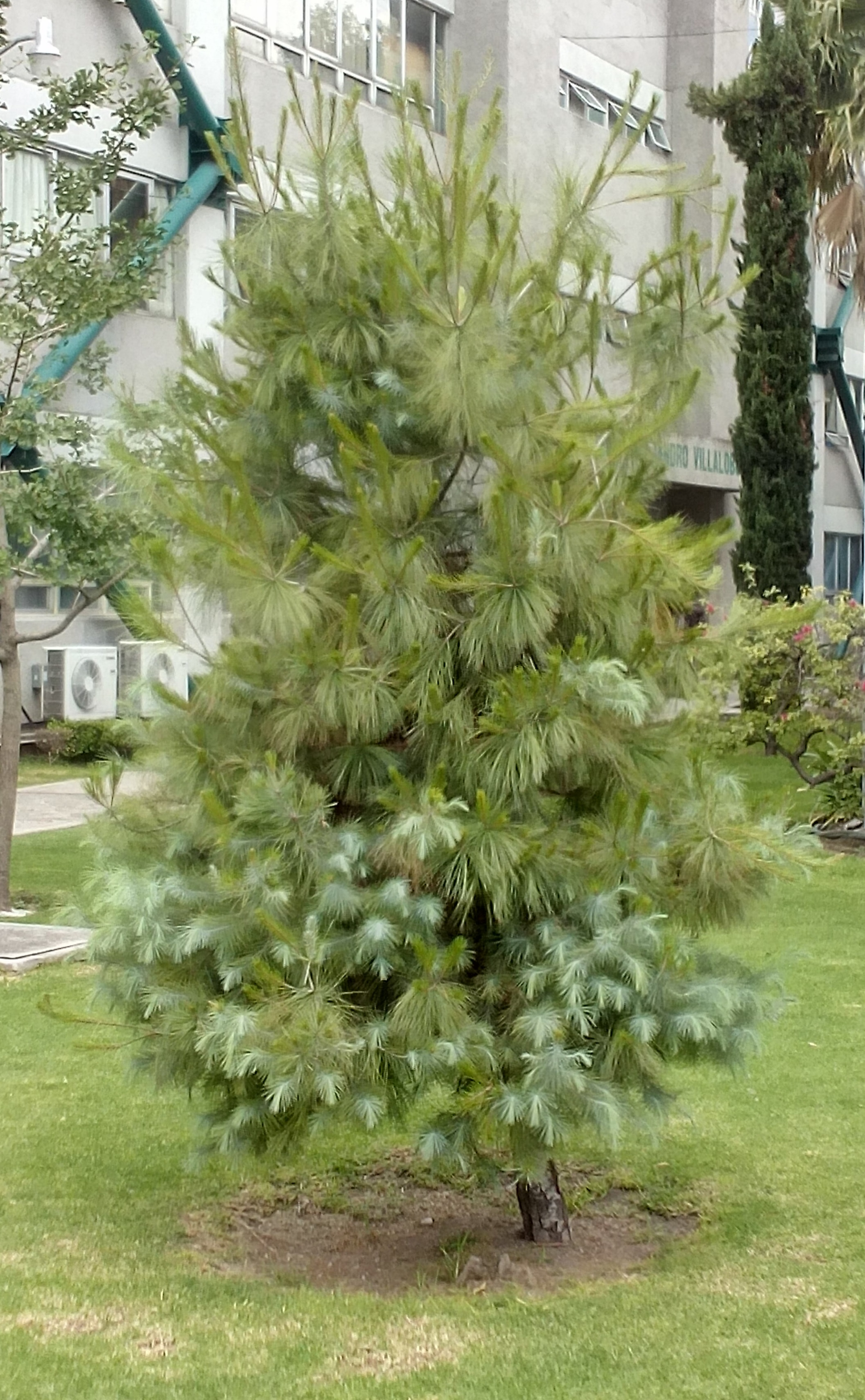 Ejemplar joven de Pinus maximartinezii, en las áreas verdes de la Universidad Autónoma Metropolitana.